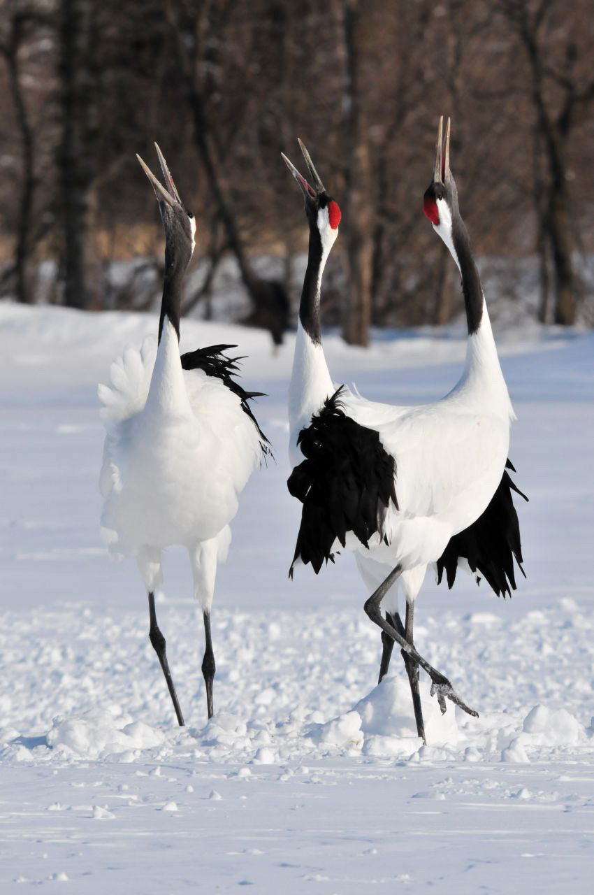 鳴き声を上げるタンチョウ。2012年2月、釧路市の阿寒国際ツルセンターにて。撮影者のブログはこちら。